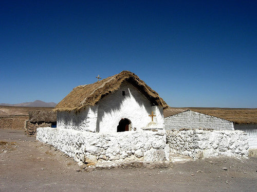 Iglesia de Ancuta. Territorio de Guallatire, Comuna de Putre, Chile